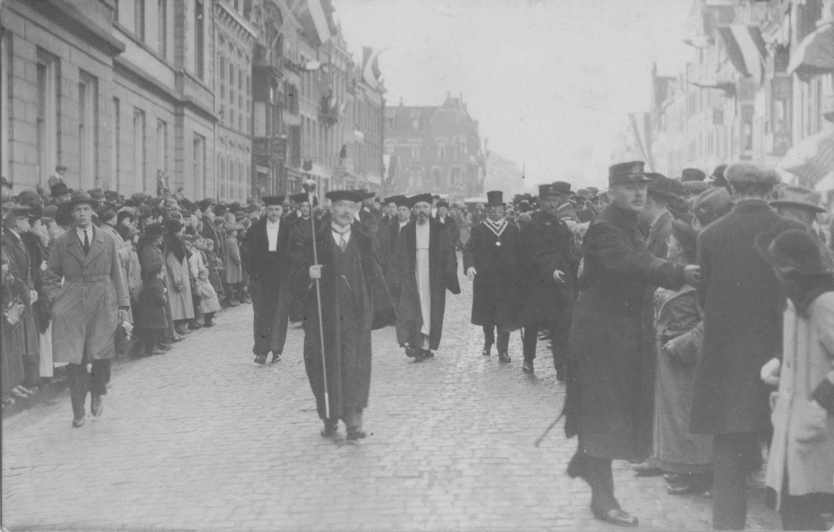 De opening van de Rooms Katholieke Universiteit (17 oktober 1923); de pedel en de professoren op weg naar de Ignatius-kerk.